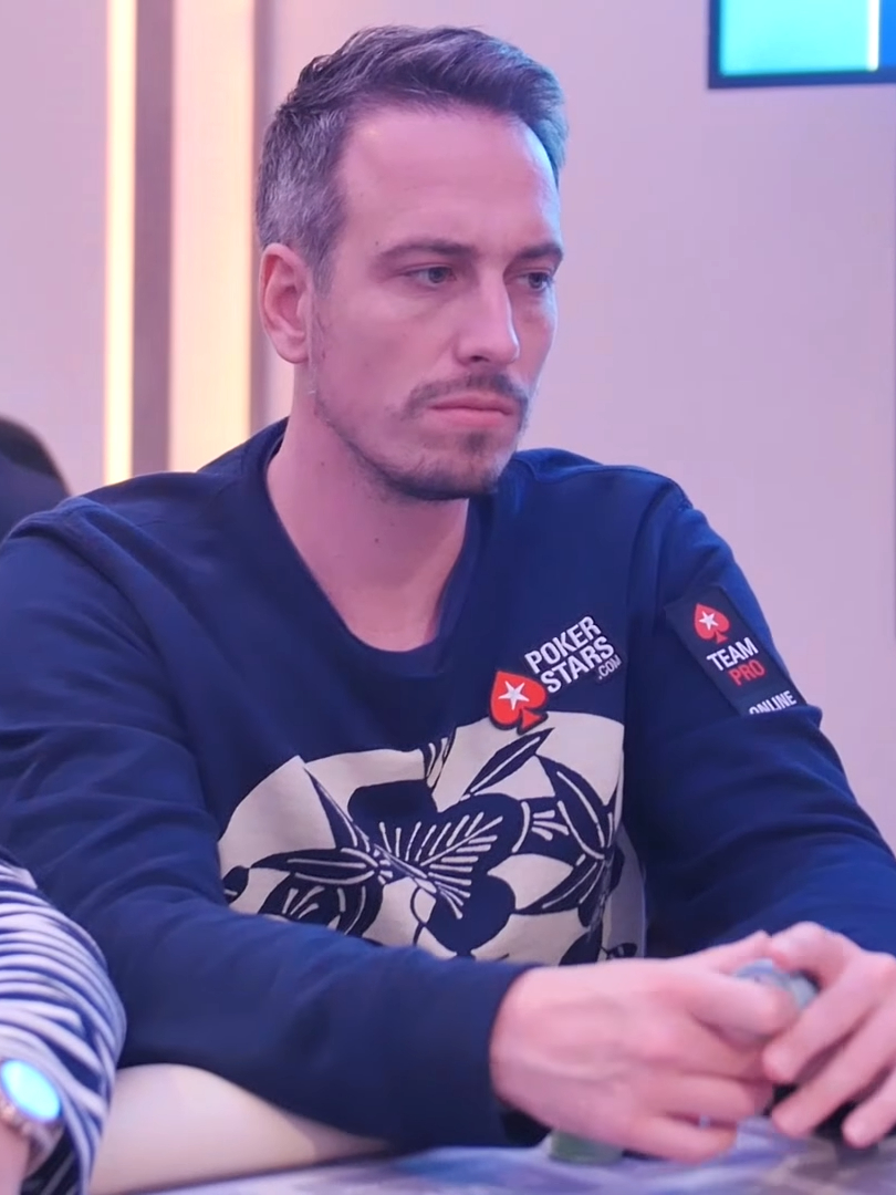 Lex Veldhuis bei der WPT Amsterdam